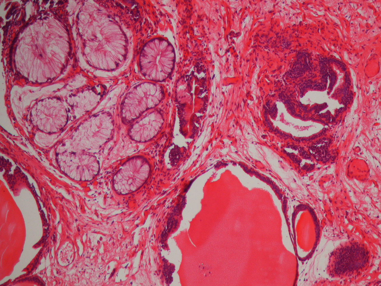 Histologisches Bild einer Urocystitis glandularis et cystica mit intestinaler Metaplasie